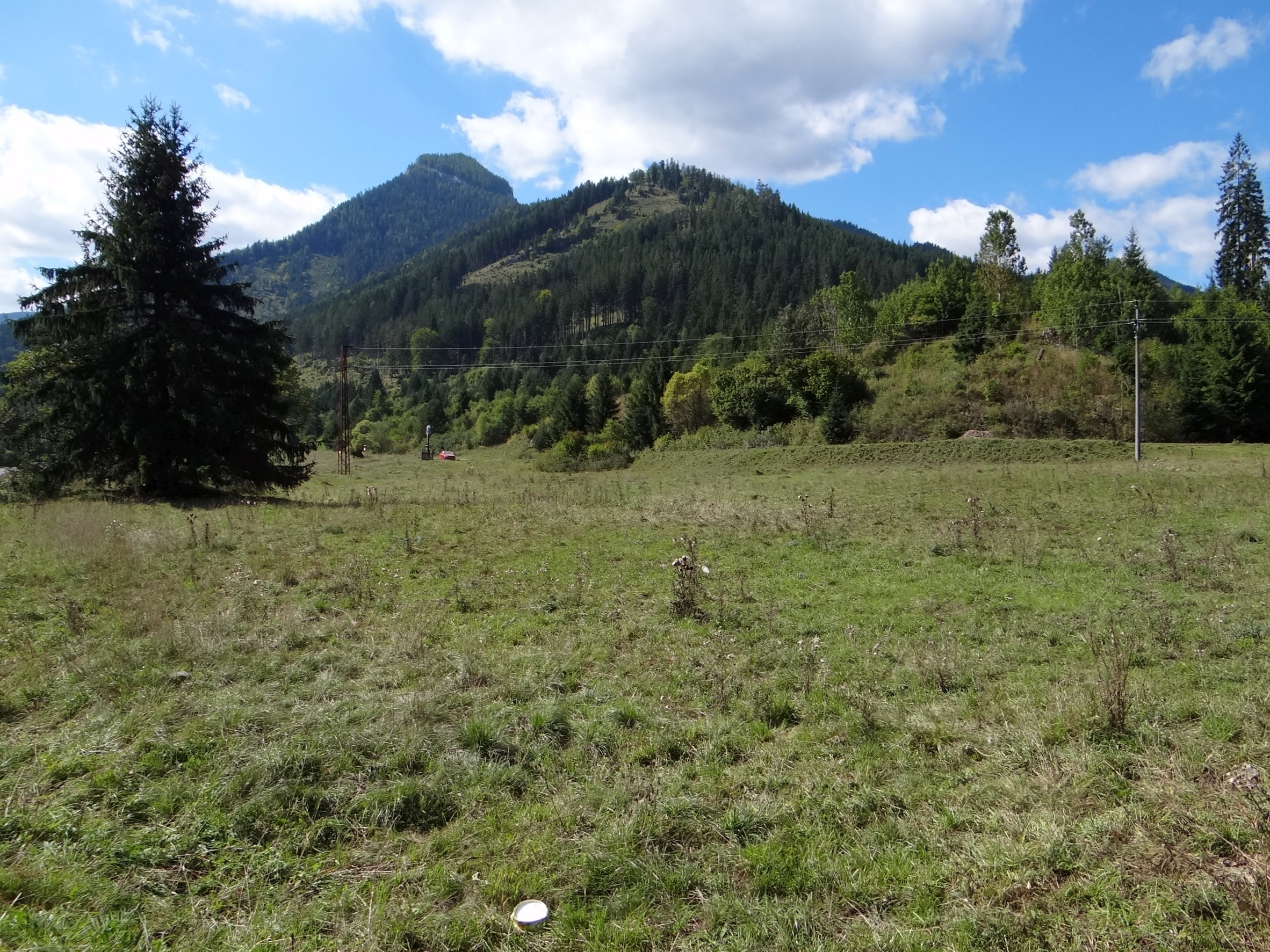 Hradište (Bocianska dolina)